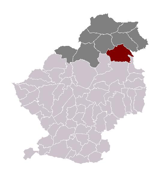 Beuvry-la-Forêt dans son canton et son arrondissement